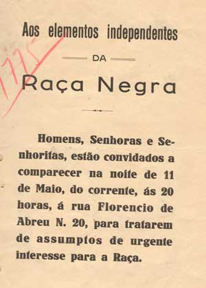 Panfleto da Frente Negra Brasileira, convidando a população negra de SP para comparecer a assembléia da entidade, criada em 1931 para reivindicar os direitos políticos da classe.